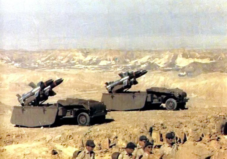 Luz (missile) 1961